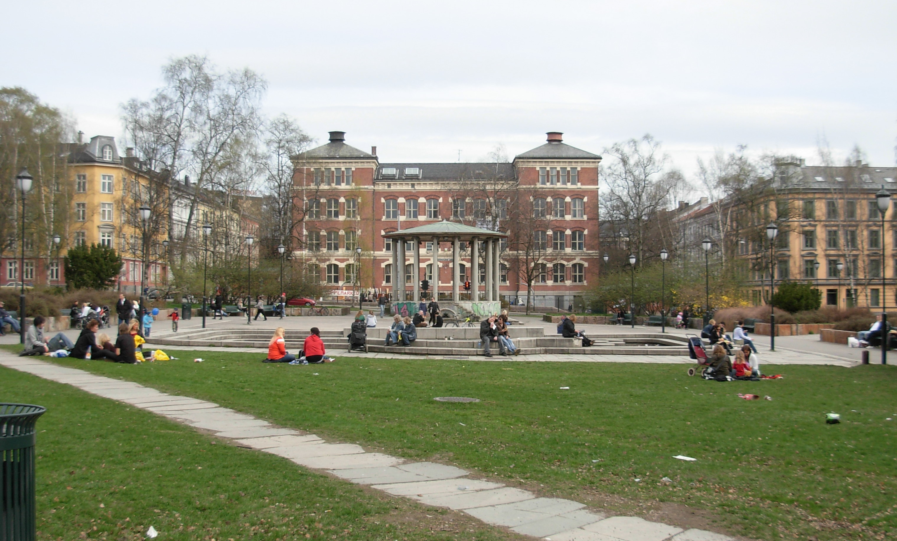 Birkelunden park, with Grünerløkka skole